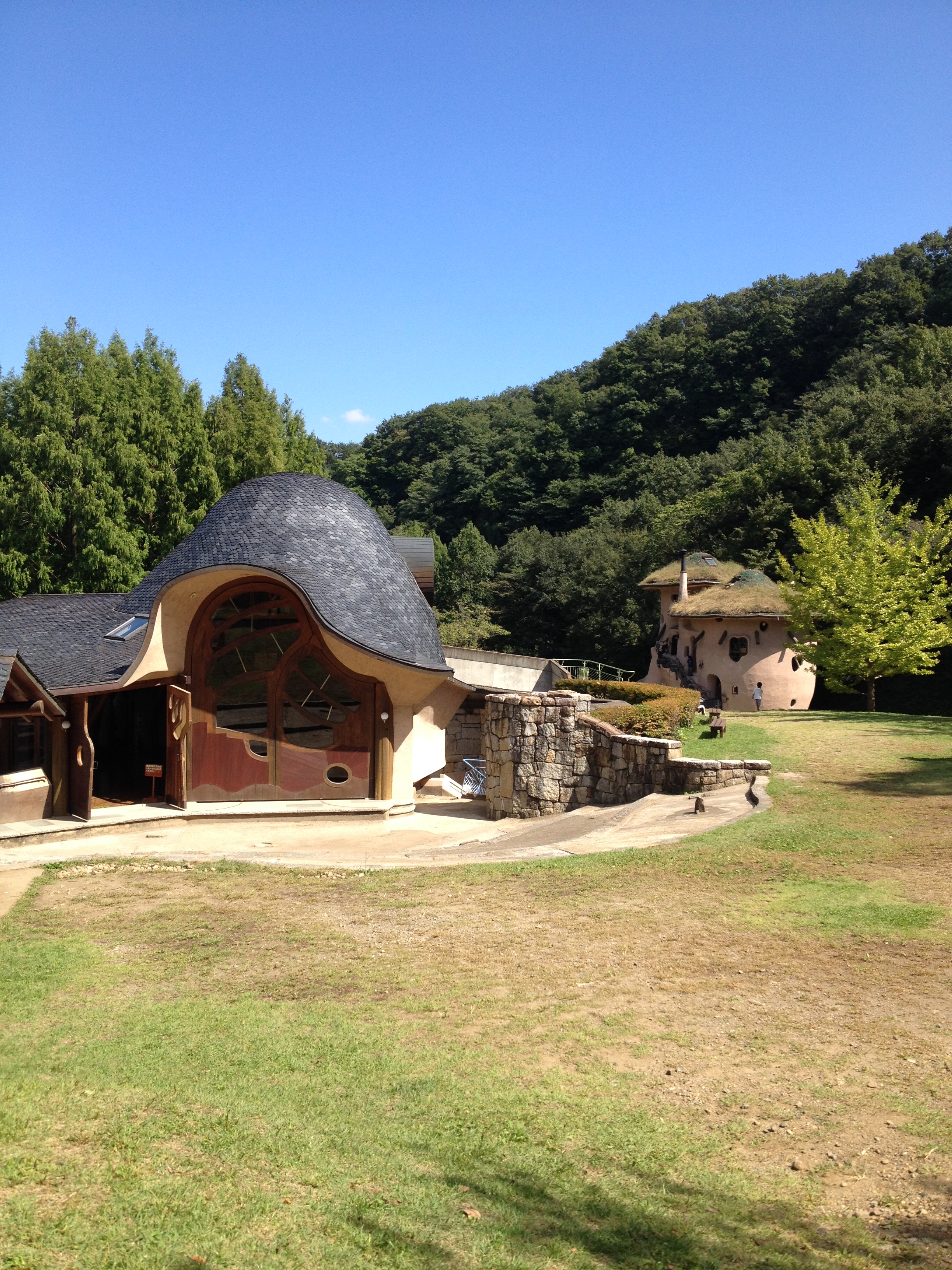 あけぼの子どもの森公園（飯能市）